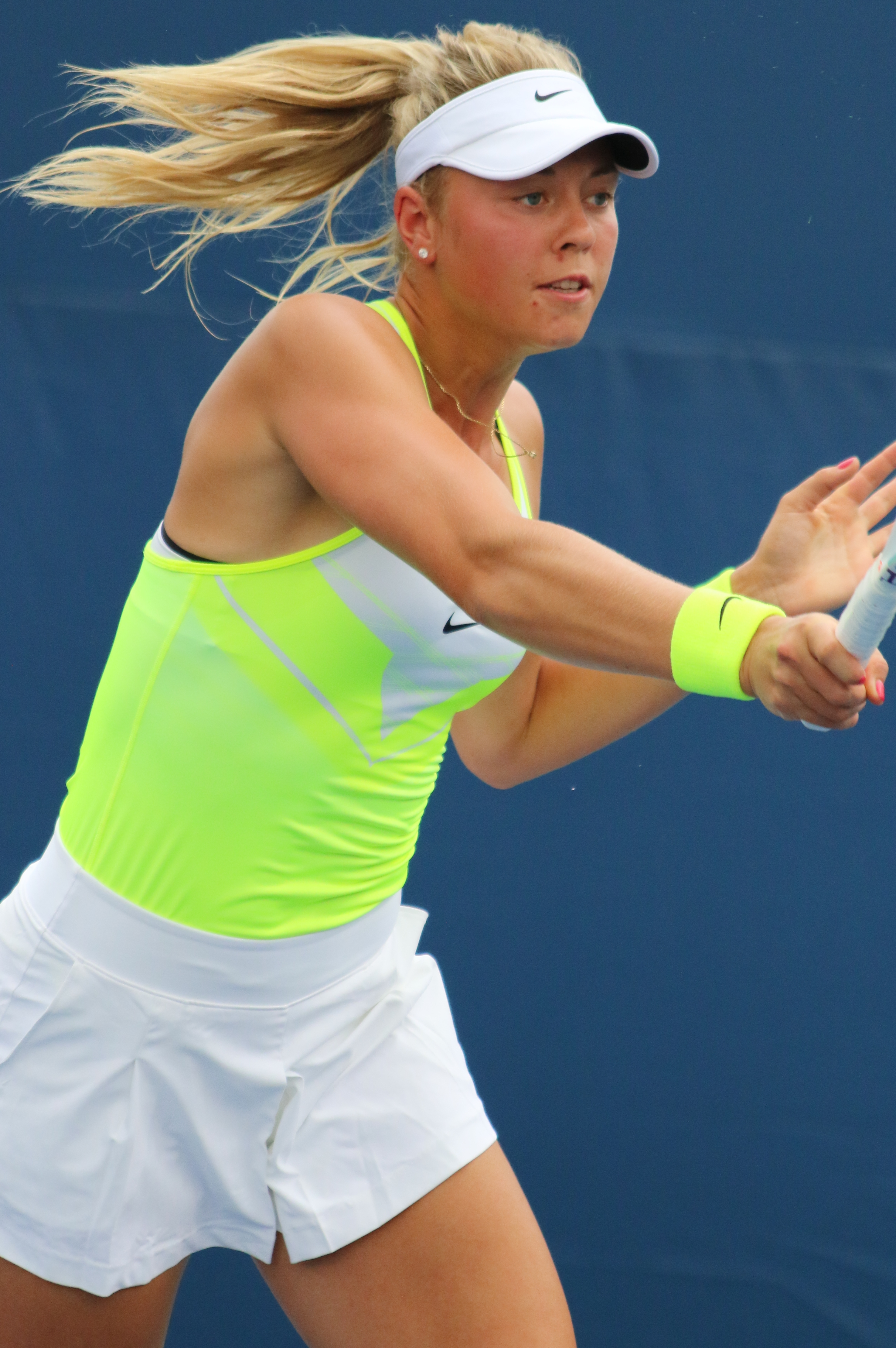 Witthöft US16 (18)